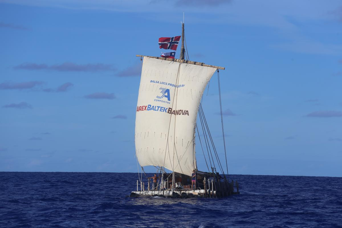 Balsaflåten Rahiti Tane på vei fra Peru til Påskeøya desember 2015